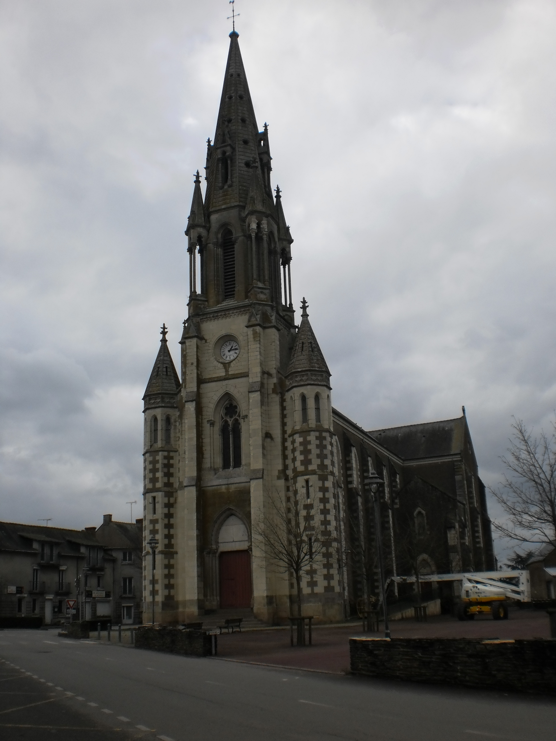 Grand-Auverné (Loire-Atlantique, France) - église